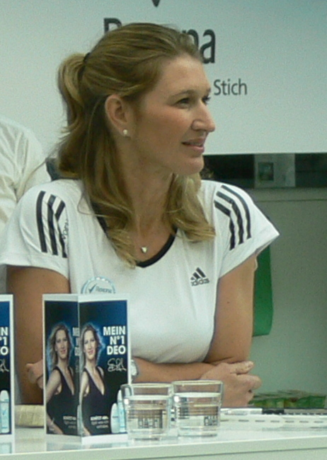 Matthias Opdenhövel und Steffi Graf